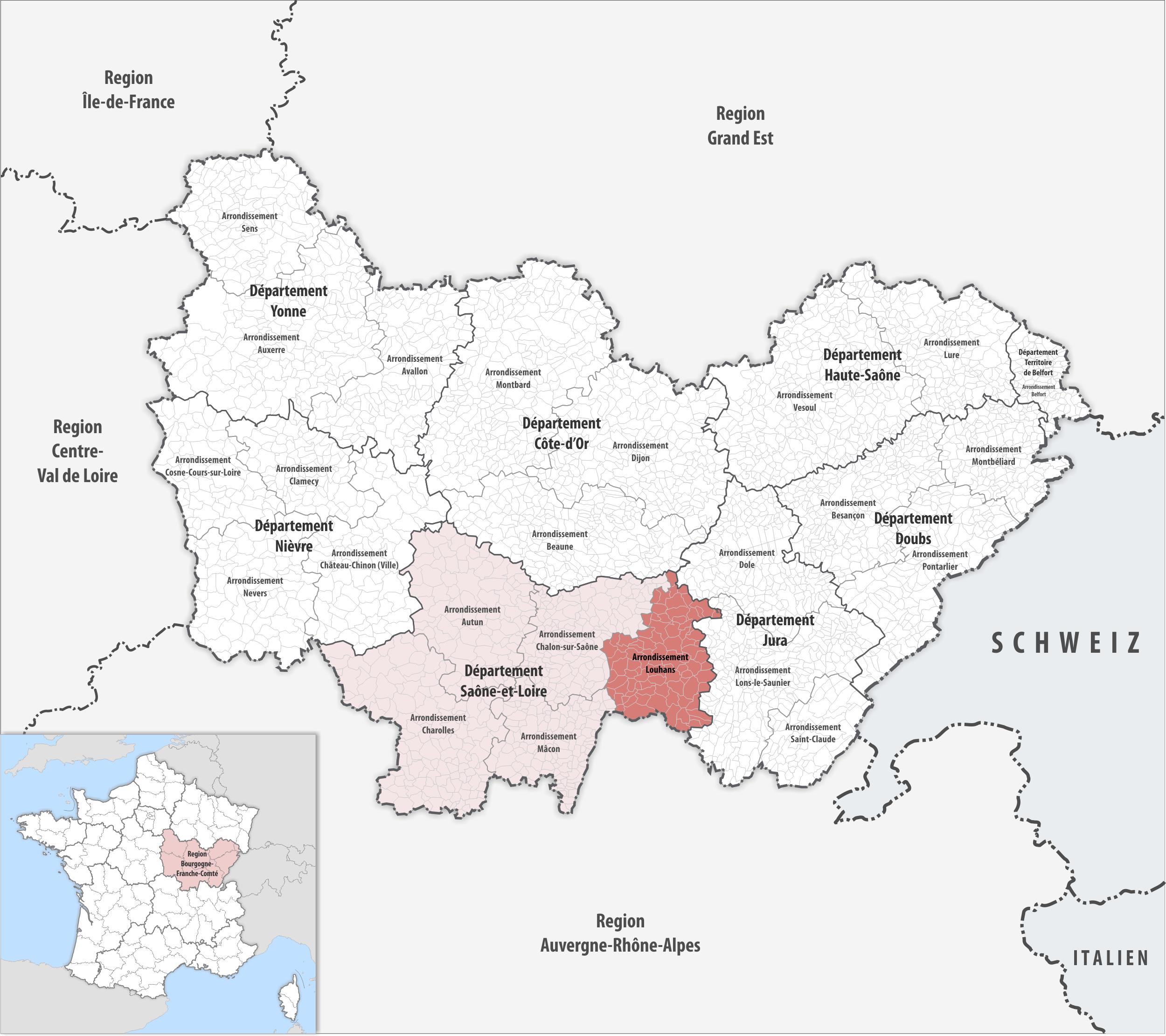 Lage des Arrondissements Louhans